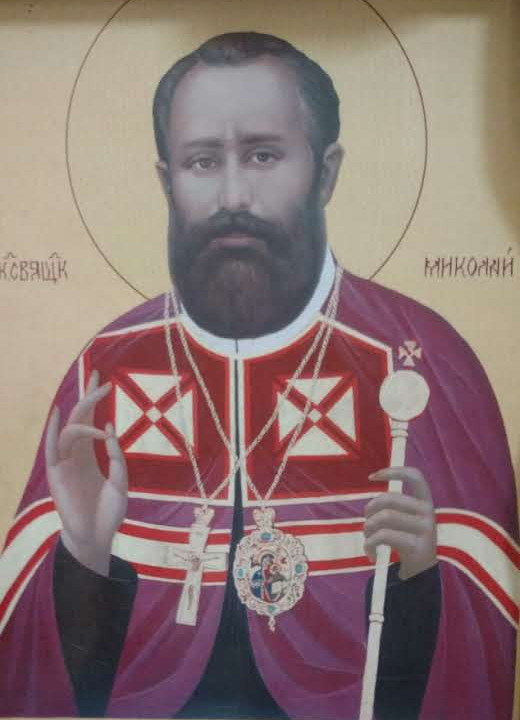 Icône de Nikola Carneckyj, église saint Athanase de Villeurbanne.